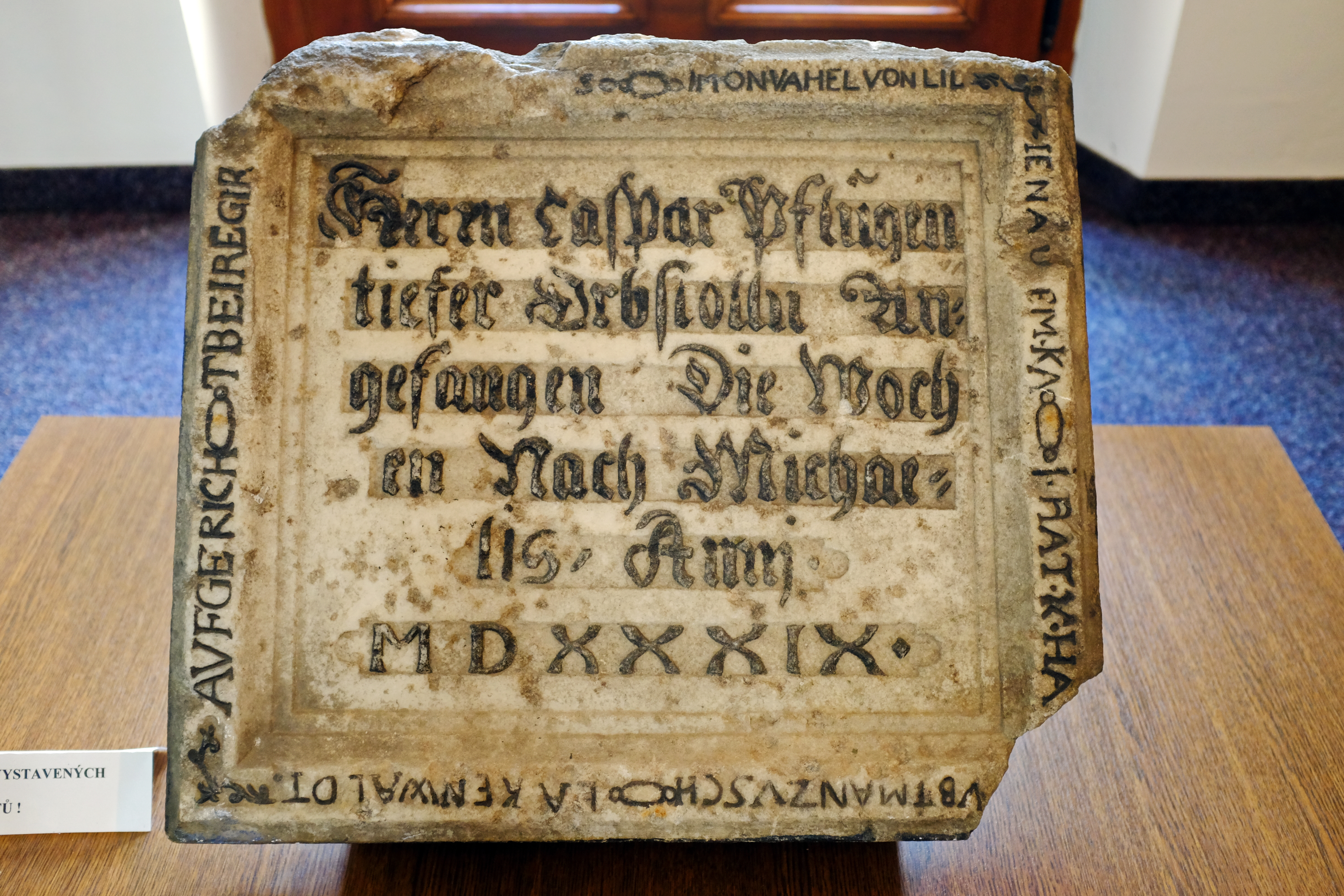 Odvodňovací dědičná štola G. Pfluga, u silnice z Horního Slavkova na Loket, Údolí I, původní mramorová deska z portálu štoly z roku 1539 umístěná v muzeu v Horním Slavkově Horní Slavkov.